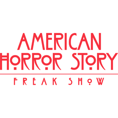 Logo de la temporada